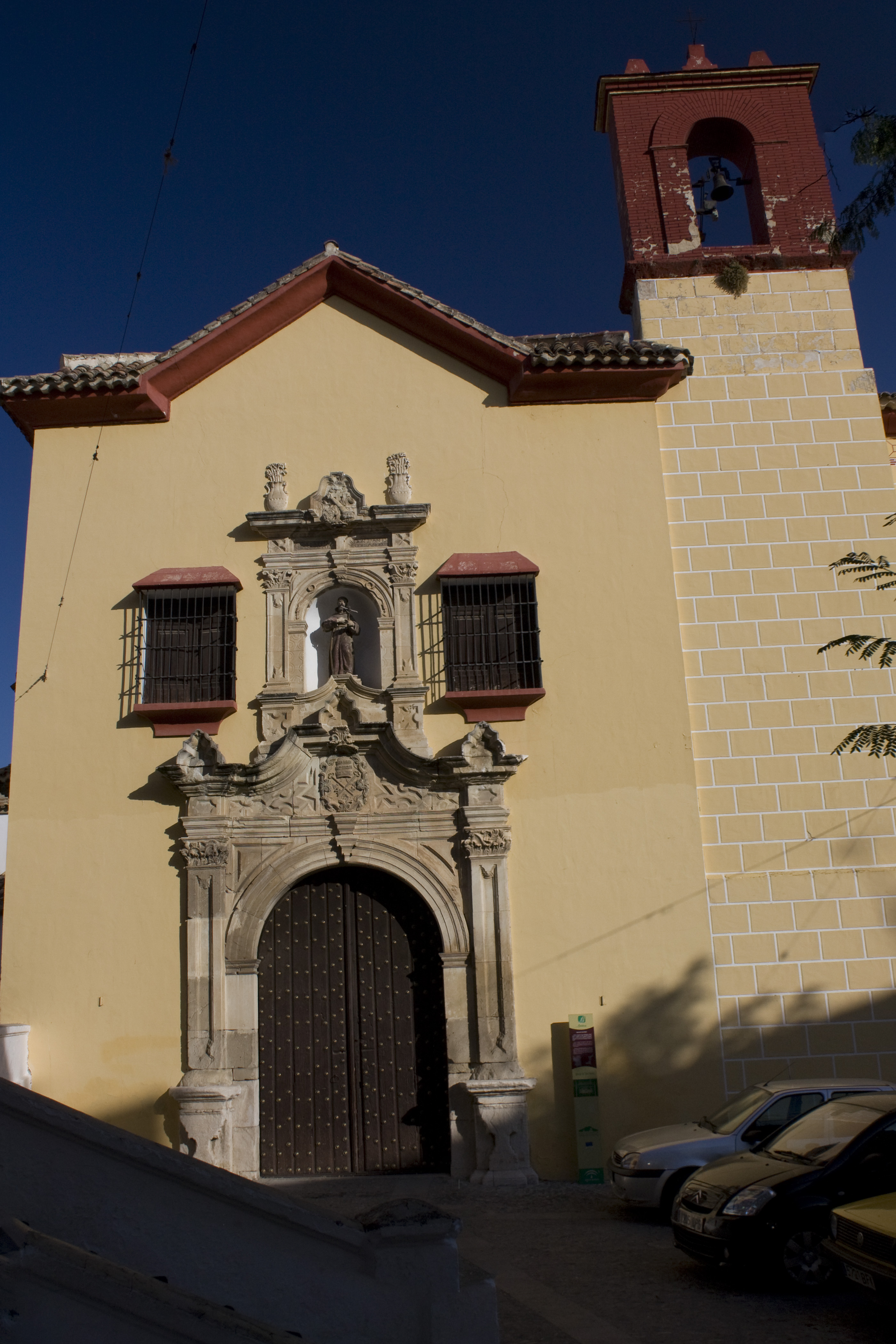 Église Saint Pierre